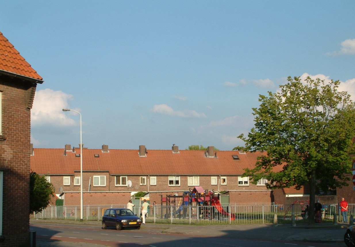 Straat in de wijk Lakerlopen in Eindhoven (Tongelre, De Laak)